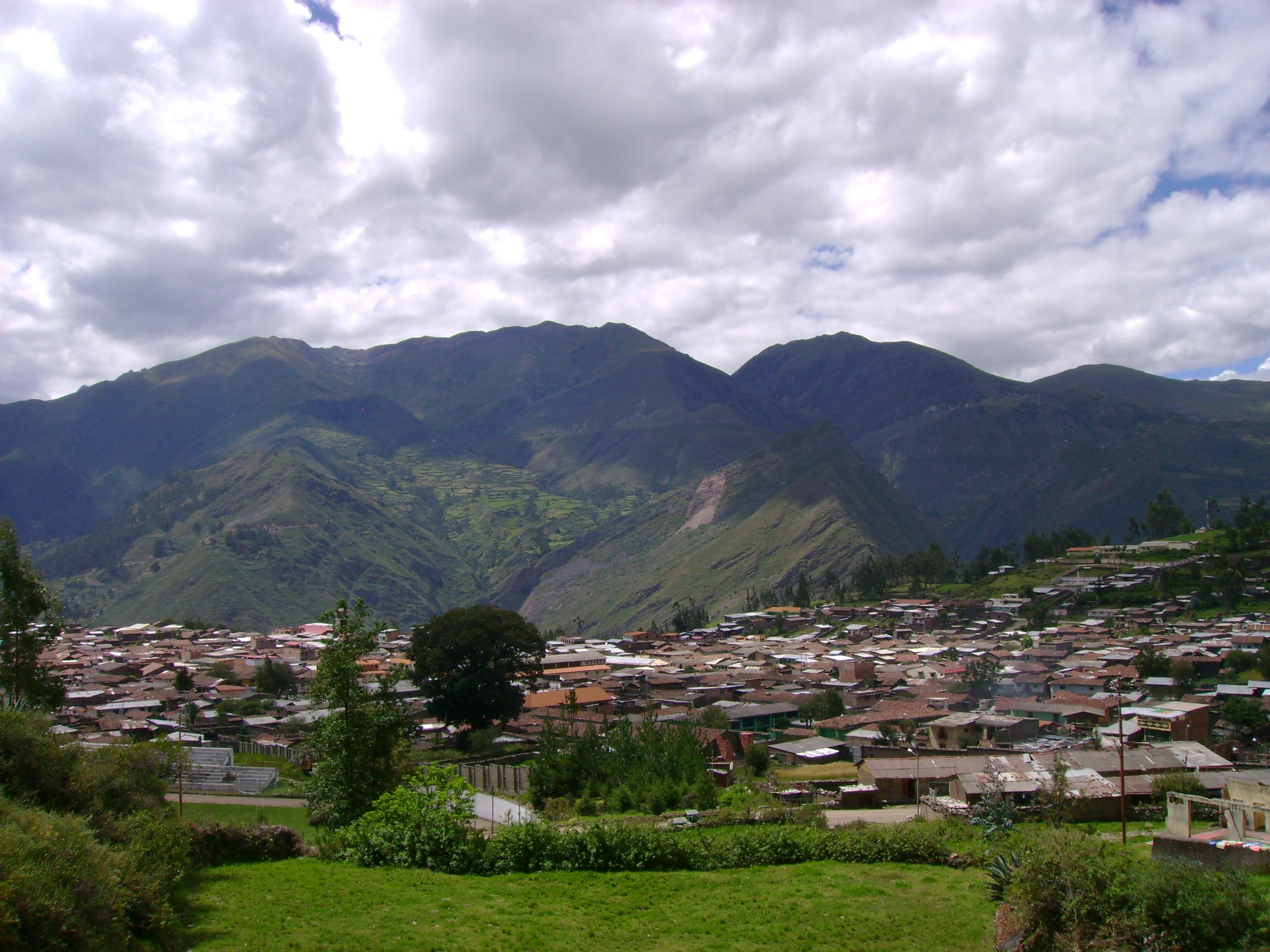 Chiquián vista desde la carretera.